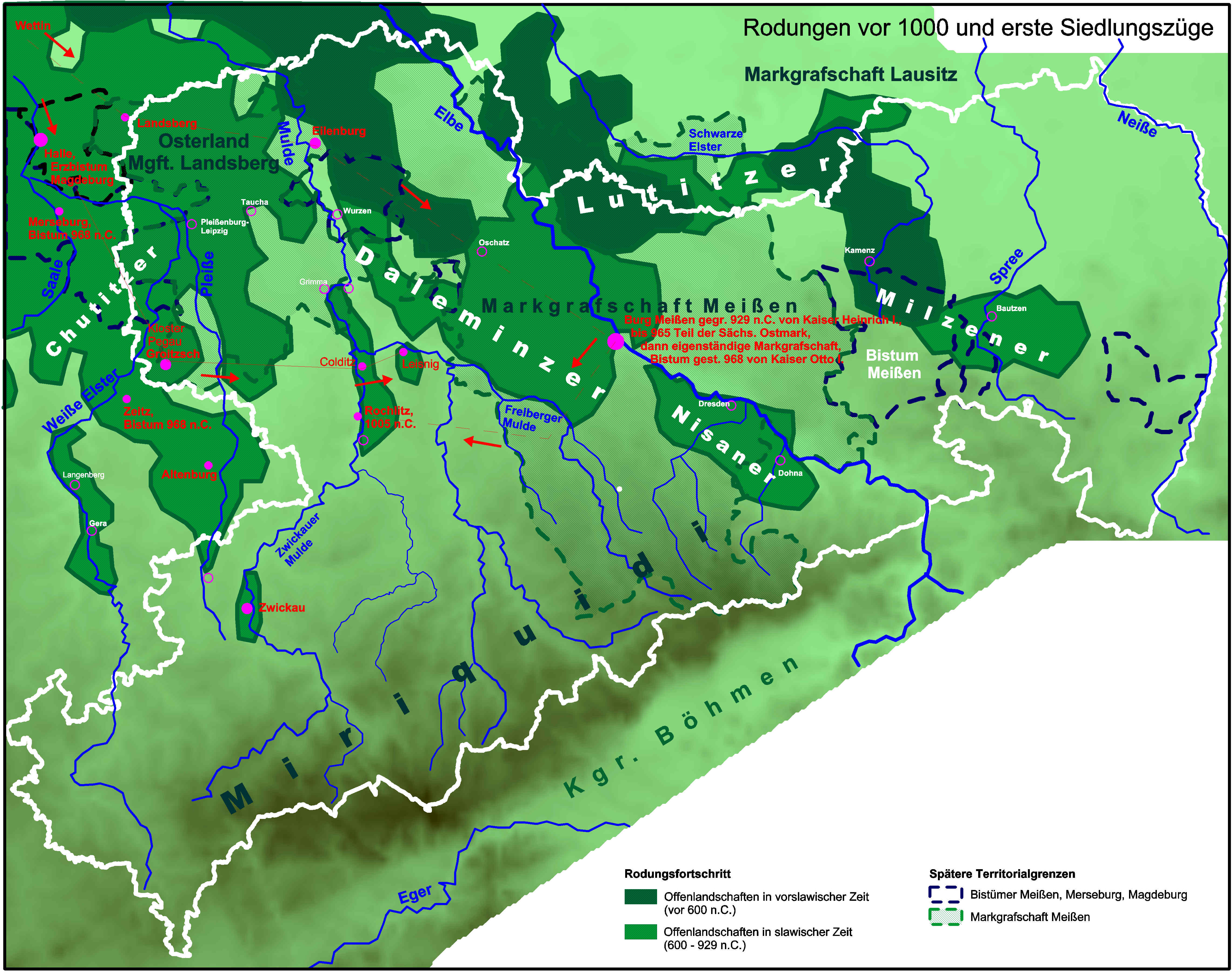 slawische Siedlungsgebiete um 1000 n.C. (Digitalisierung aus verschiedenen Quellen)